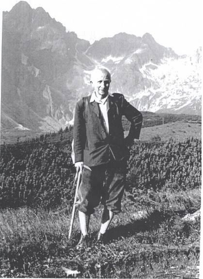 Alfréd Grosz, 1885 - 1973) Pedagóg, geograf, horolezec, historikk, publicista. Pôsobil v Kežmarku ako gymnaziálny profesor. Jeho otec bol spoluzakladateľom UKS a to ovplyvnilo aj jeho orientáciu. Do V. T. za horolezeckým výkonom prichádza po prvý raz ako 16-ročný s cieľom vystúpiť na Jastrabiu vežu. Nepodarilo sa, no vytrvalosť a húževnatosť ho postupne zaradili medzi výrazné osobnosti tatranského horolezectva. Má za sebou viac ako stovku prvovýstupov, variant, druhých a tretích priestupov, z nich je osem zimných. Významná je jeho publikačná činnosť. Spolupracoval na tvorbe horolezeckého sprievodcu Vysokými Tatrami s Gyulom Kamarnickým, neskôr s Januszom Chmielowskim a Witoldom Henrykom Paryskim. Sám napísal publikáciu Vysoké Tatry - Dejiny Karpatského spolku a zbierku tatranských povestí. Knihy vyšli v Nemecku. Publikoval mnohé články v regionálnej a odbornej tlači.